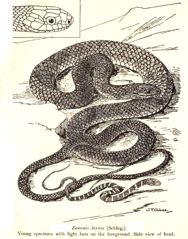 Zamenis korros, Ptyas korros